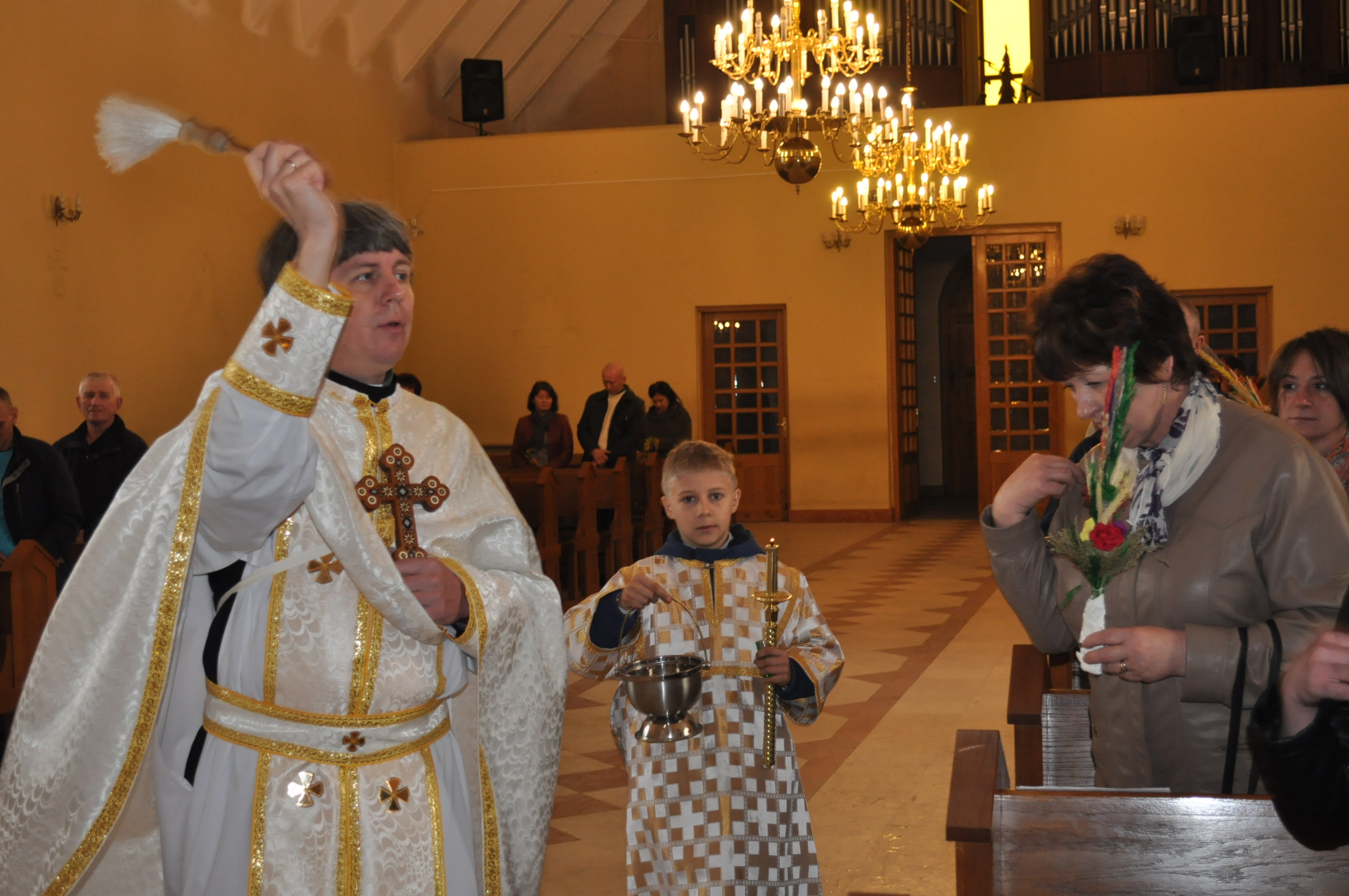 Liturgia bizantyjsko-ukraińska Niedzieli Palmowej 9 kwietnia 2017 r. w kościele Miłosierdzia Bożego w Grójcu